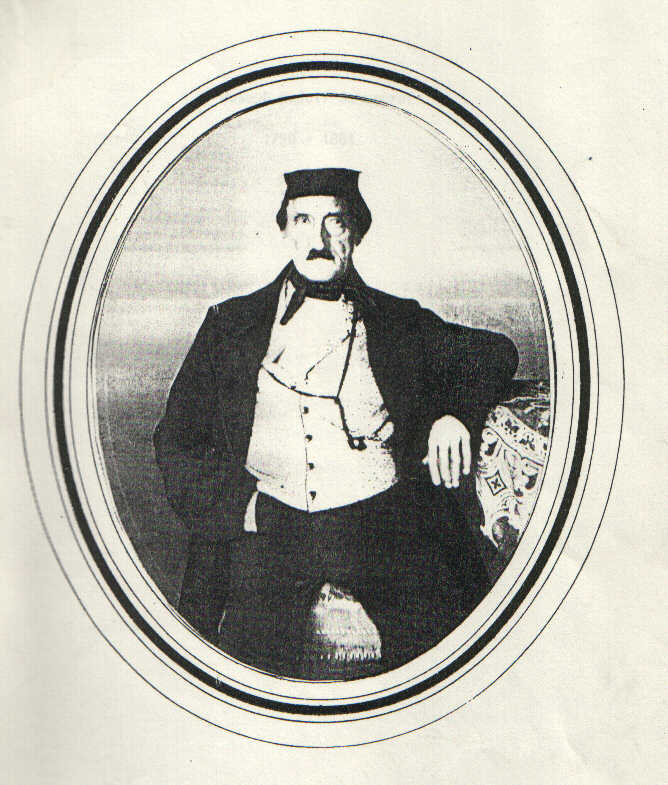 Joseph Ruedolf Schuegraf